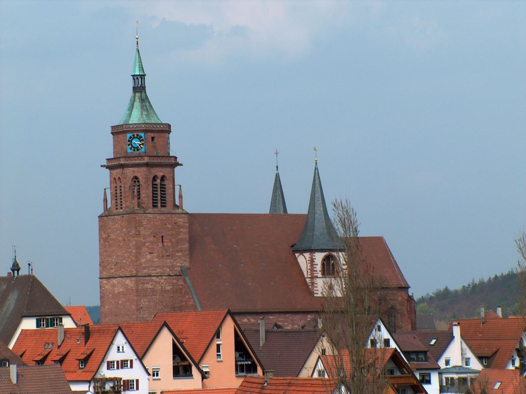 Beschreibung: Peter und Paul Kirche in Weil der Stadt fotografiert von der Ostelsheimer Steige Fotograf: User:MarkusHagenlocher Aufnahmedatum: Mai 2005